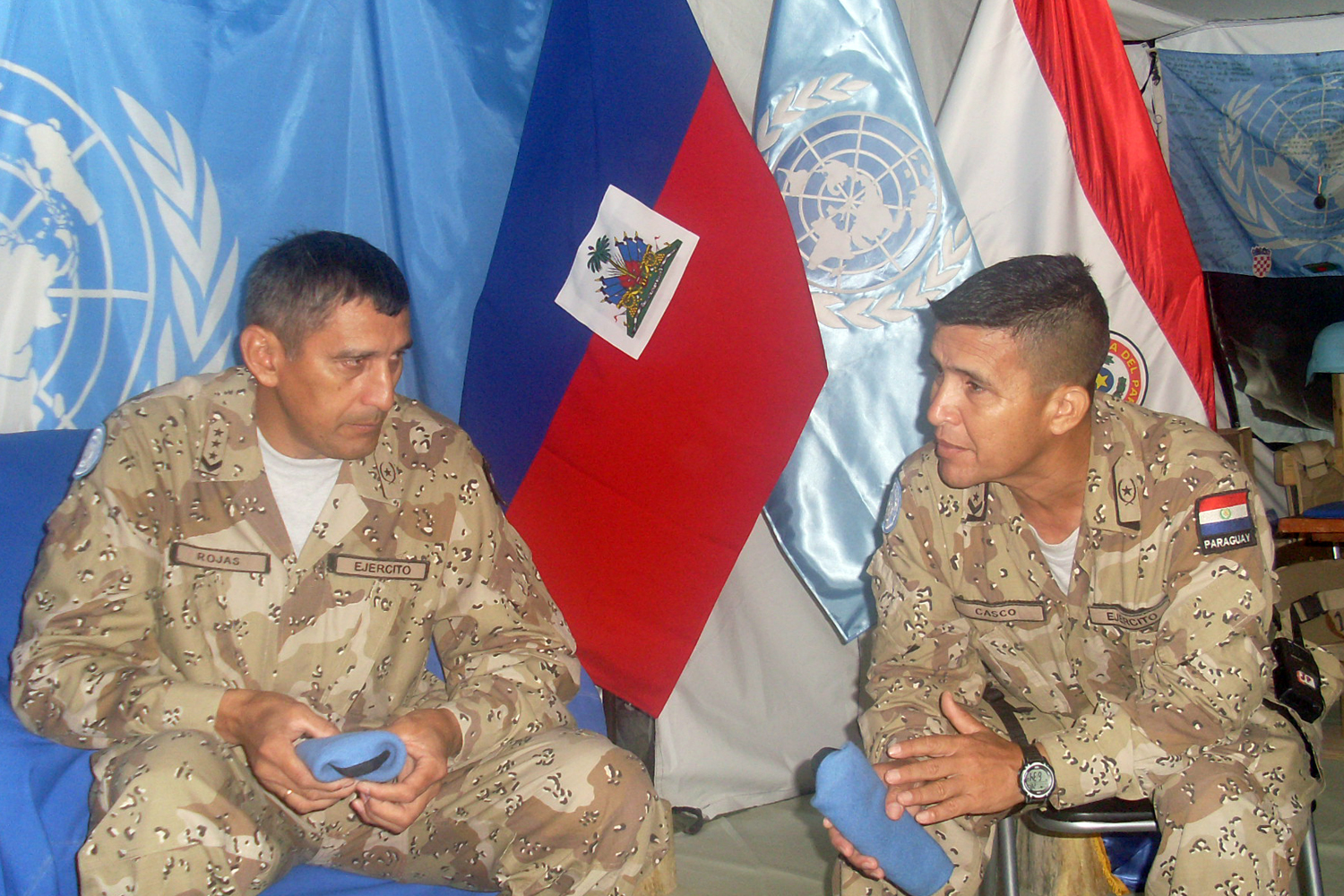 Por invitación del Gobierno de Estados Unidos y del Comando de las Fuerzas Militares, medios de comunicación paraguayos viajaron a Haití para interiorizarse del trabajo de los militares paraguayos y para observar el lugar, un año después del terremoto. Allí, se encuentra un contingente de 100 militares paraguayos, desde el 19 de diciembre de 2010, para realizar tareas de ayuda a la misión de paz de las Naciones Unidas y apoyar la reconstrucción Haití, en una operación logística jamás antes emprendida por el Ejército paraguayo.